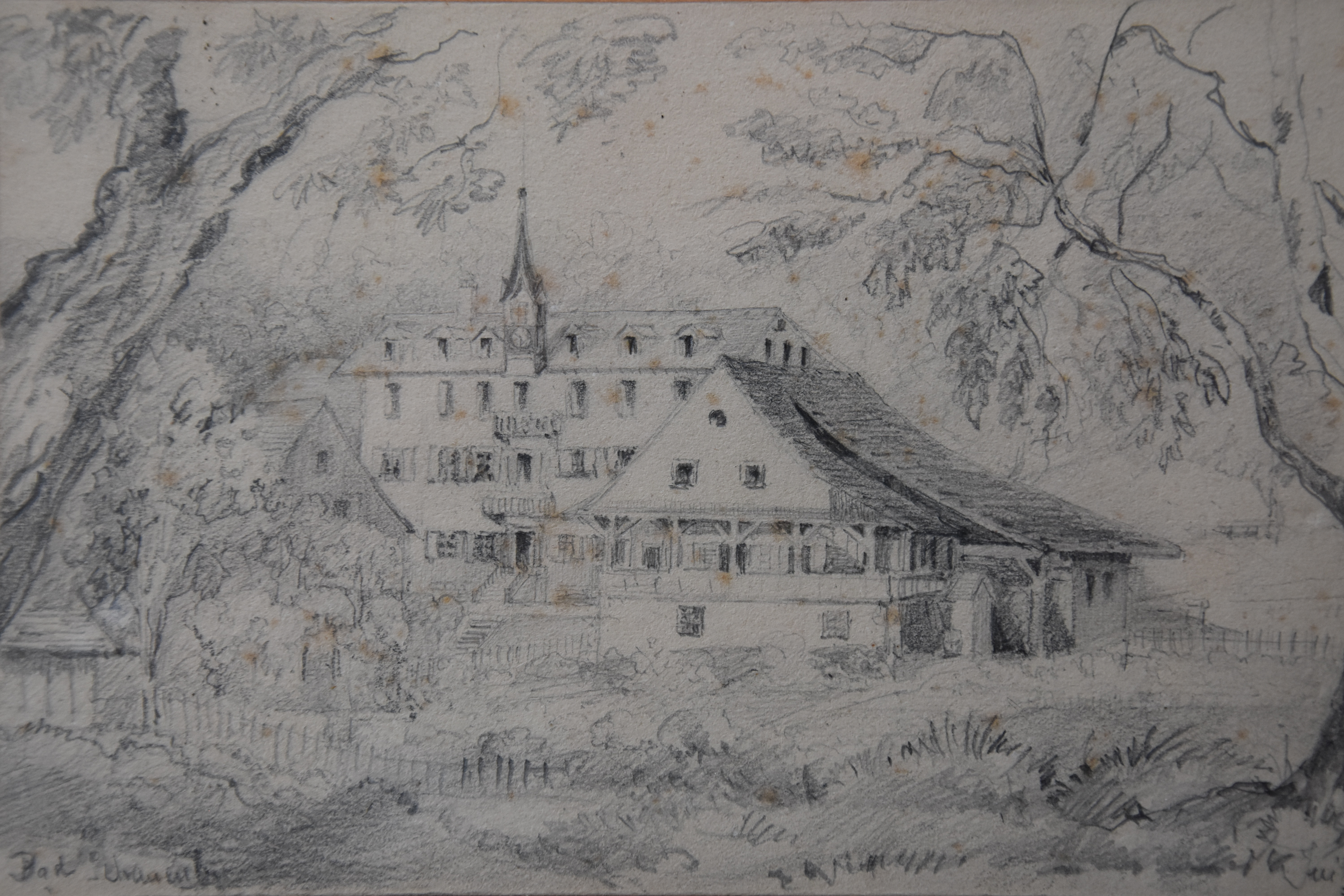 Bad Schauenburg mit Garten von Osten - 1874